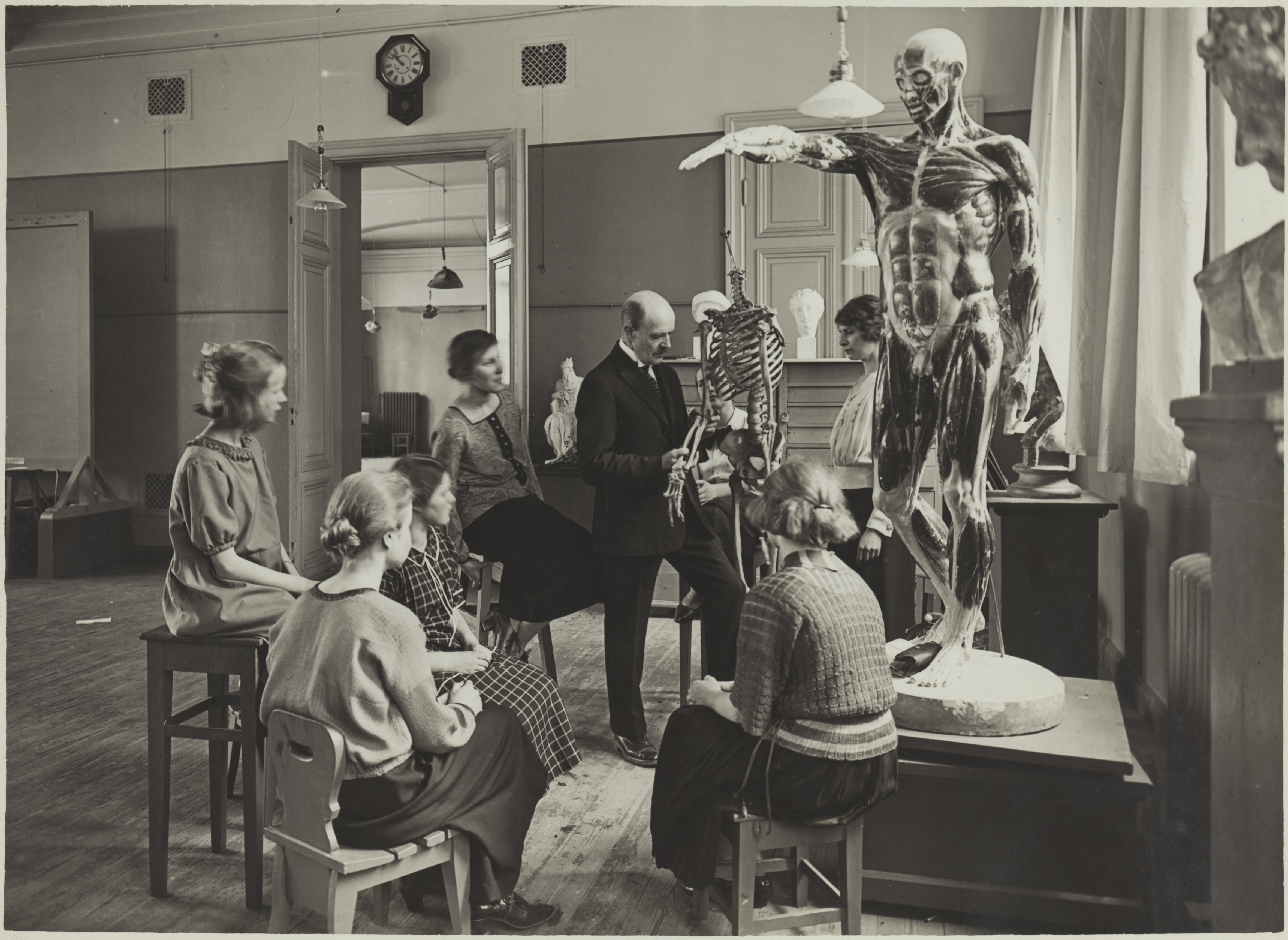 Anatomian opetustilanne, 1920- luku. Opettaja Viktor Malmberg. Taideteollisuuskeskuskoulun opetustilanteita. Aalto-yliopisto / Aalto University Tiedätkö lisää tästä kuvasta? Jätä kommentti tai ota yhteyttä sähköpostitse: Lisätietoja kuvakokoelmista / more information